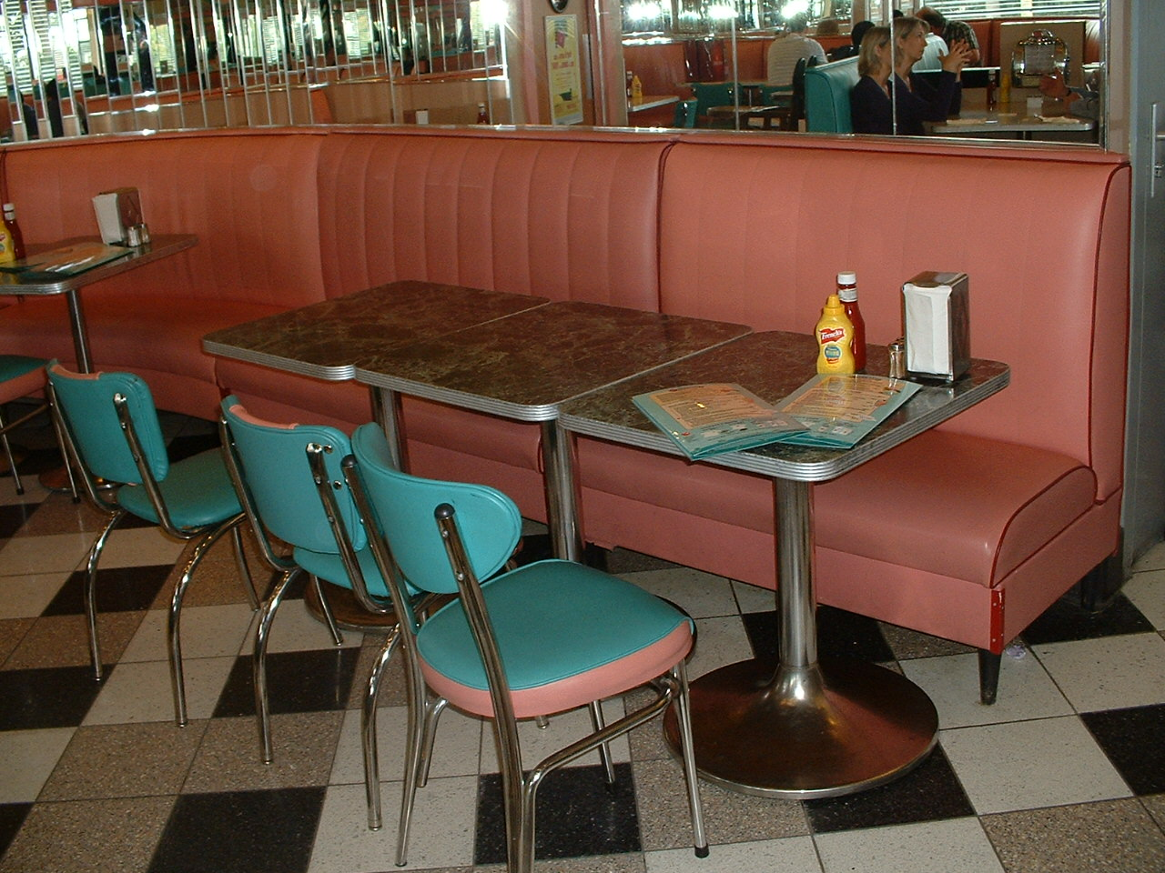 les bancs et les tables du restaurant Annette's Diner